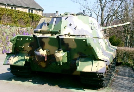 Description: Tiger II preserved at La Gleize, Belgium .